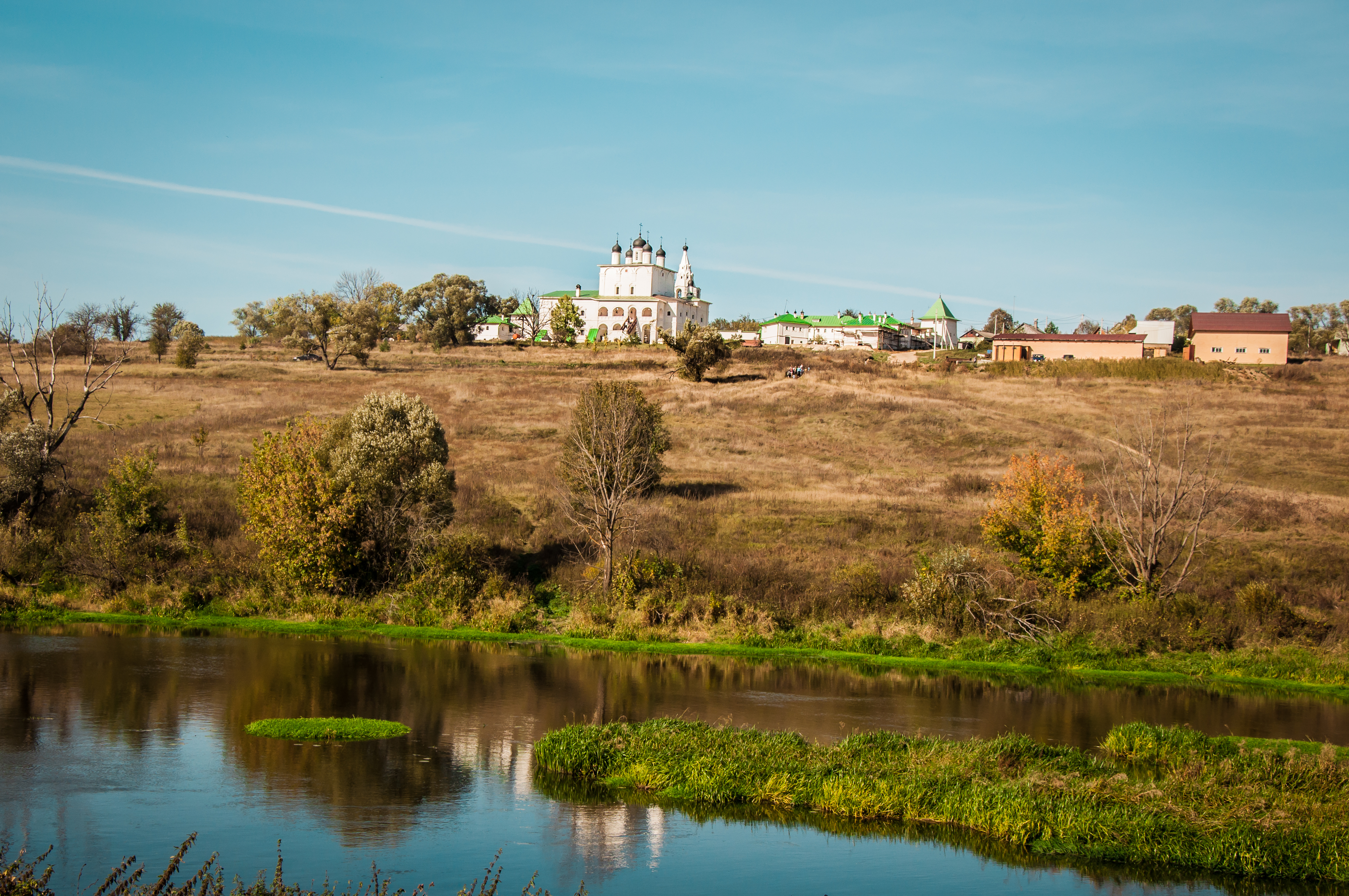 Монастырь Богородице-Рождественский Анастасов: Анастасово, Одоевский район, Тульская область